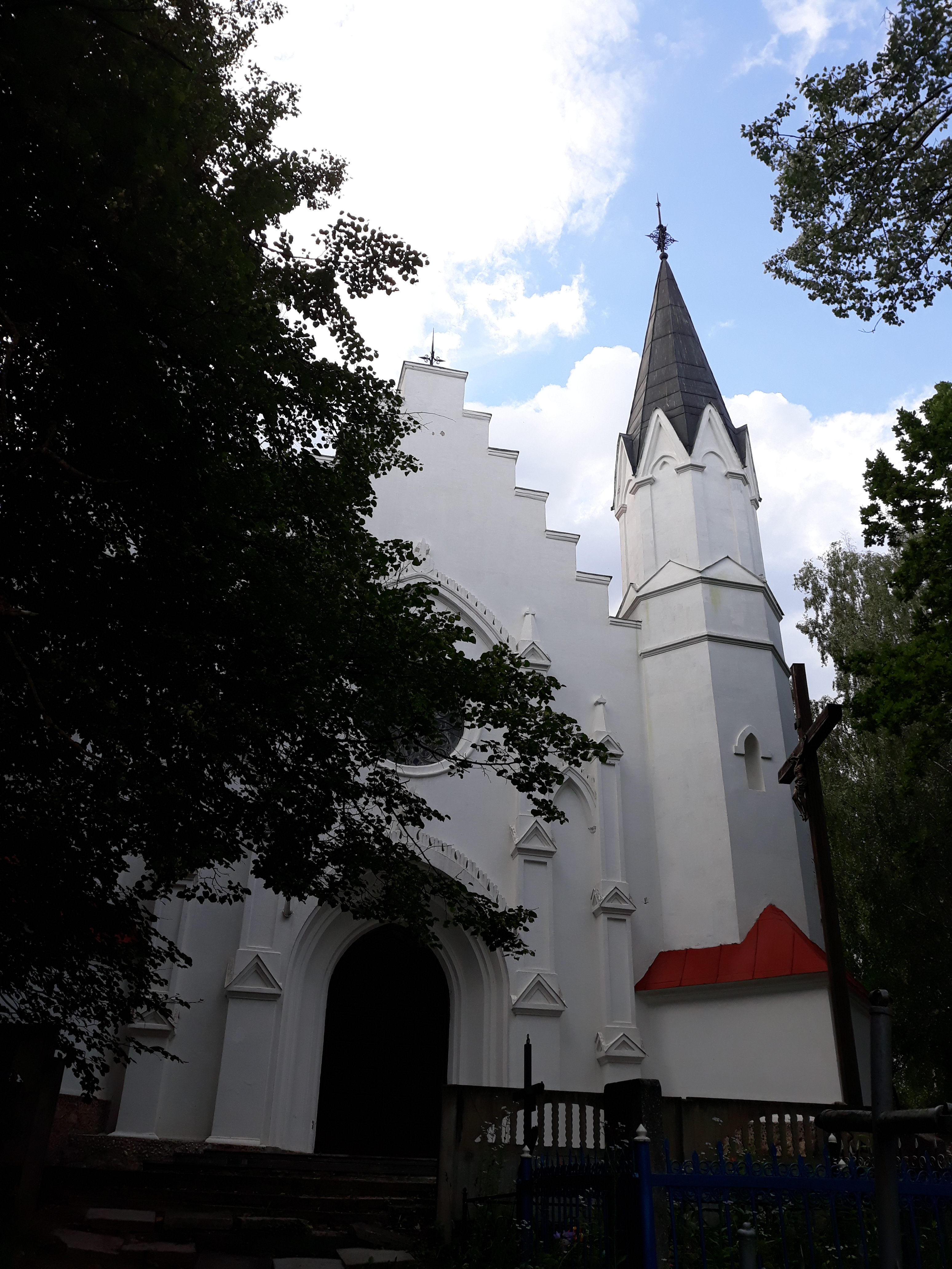 вёска Аколіца. Мінскі раён